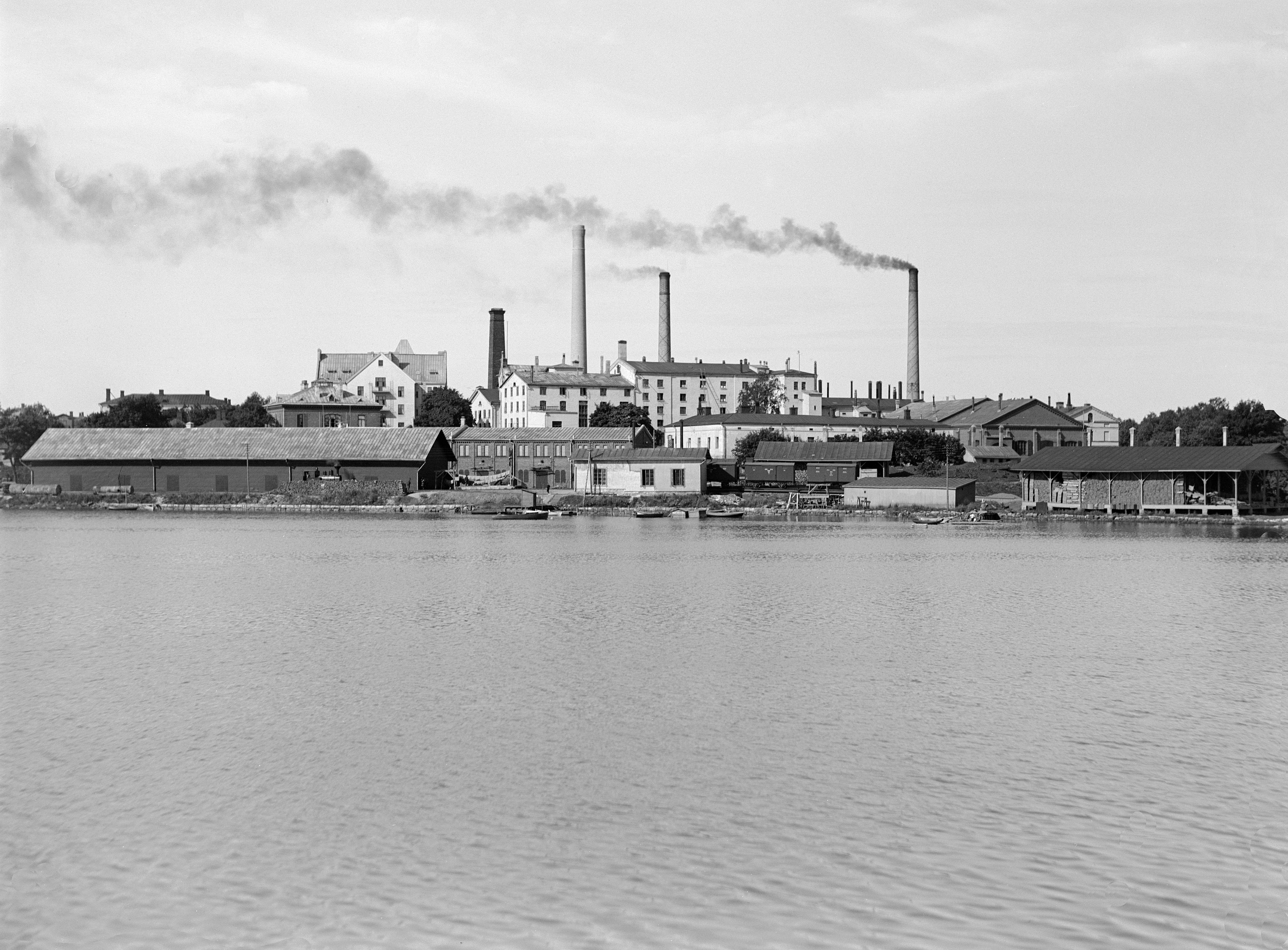 Töölö Sugar Refinery on the west bank of Töölönlahti Bay. / Töölön Sokeritehdas Töölönlahden länsirannalla. I.K. Inha 1908 Helsinki Glass negative / lasinegatiivi Accession Number / diaarinumero: d_2005_132_742 The Finnish Museum of Photography / Suomen valokuvataiteen museo Contact / Ota yhteyttä